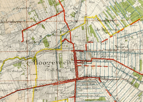 Fragment van een topografische kaart schaal 1:50.000 rond Hoogeveen. Dit is een gedeelte van de kaart Beilen nr. 17 uitgegeven in 1914. Auteursrechten voorbehouden aan de Staat der Nederlanden. De kaart is dus nu Publiek Domein vanwege ouderdom.